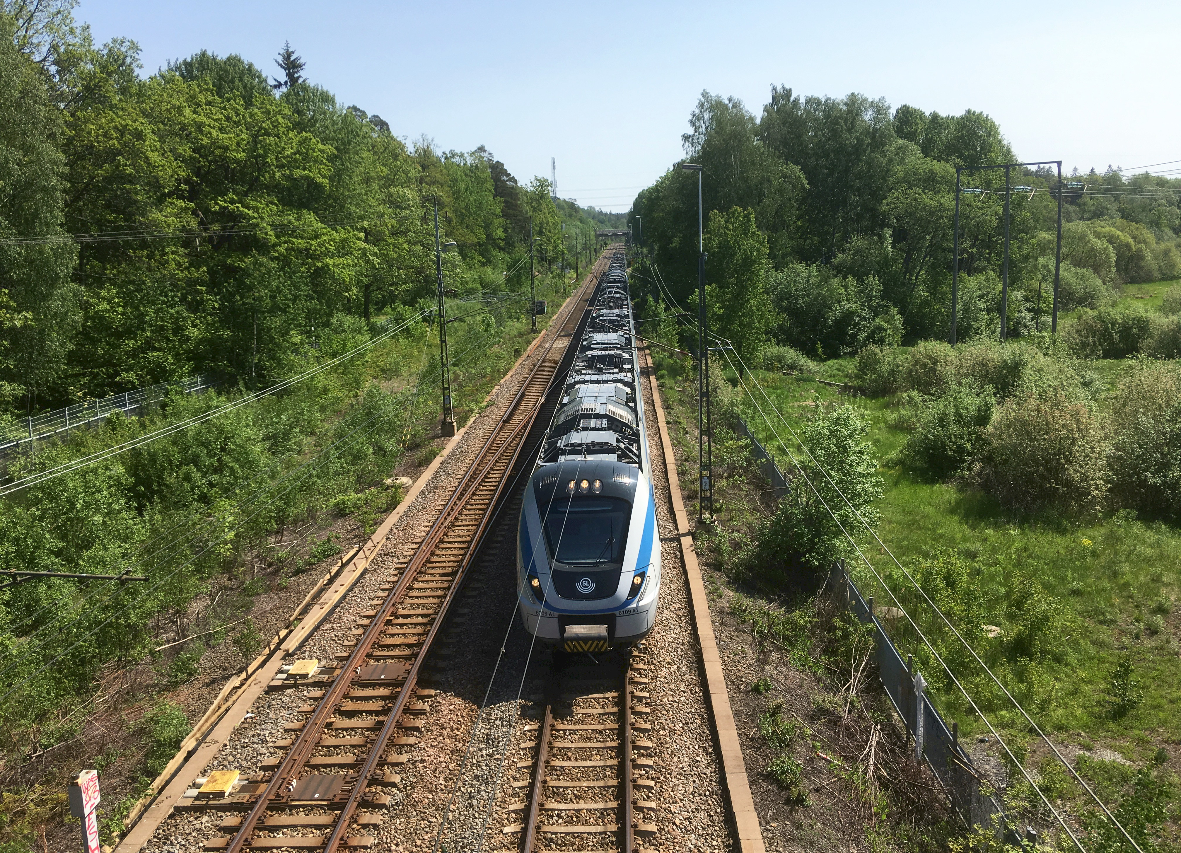 Nynäsbanan mot Älvsjö, i höjd med Högdalen